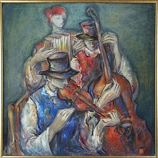 Compozitie cu personaje ulei/panza